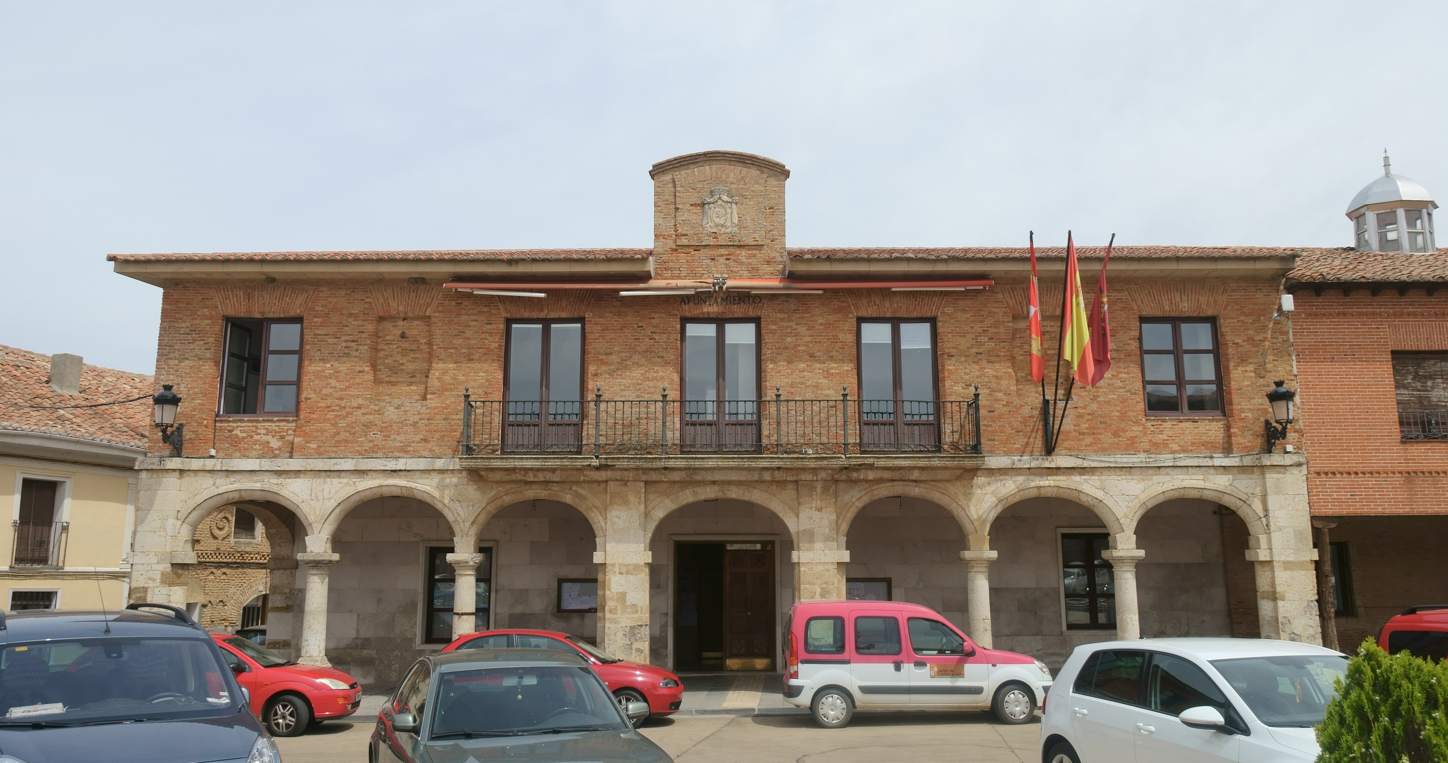 Casa consistorial de Mayorga (Valladolid, España).